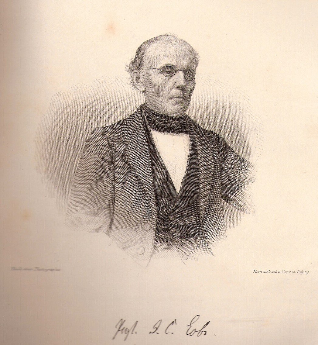 Stahlstich nach einer Photographie von Johann Christian Lobe. Veröffentlicht in der Ausgabe 8 der Allgemeinen Moden-Zeitung von 1863